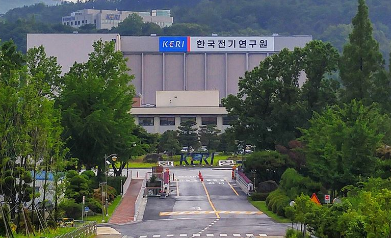 한국전기연구원